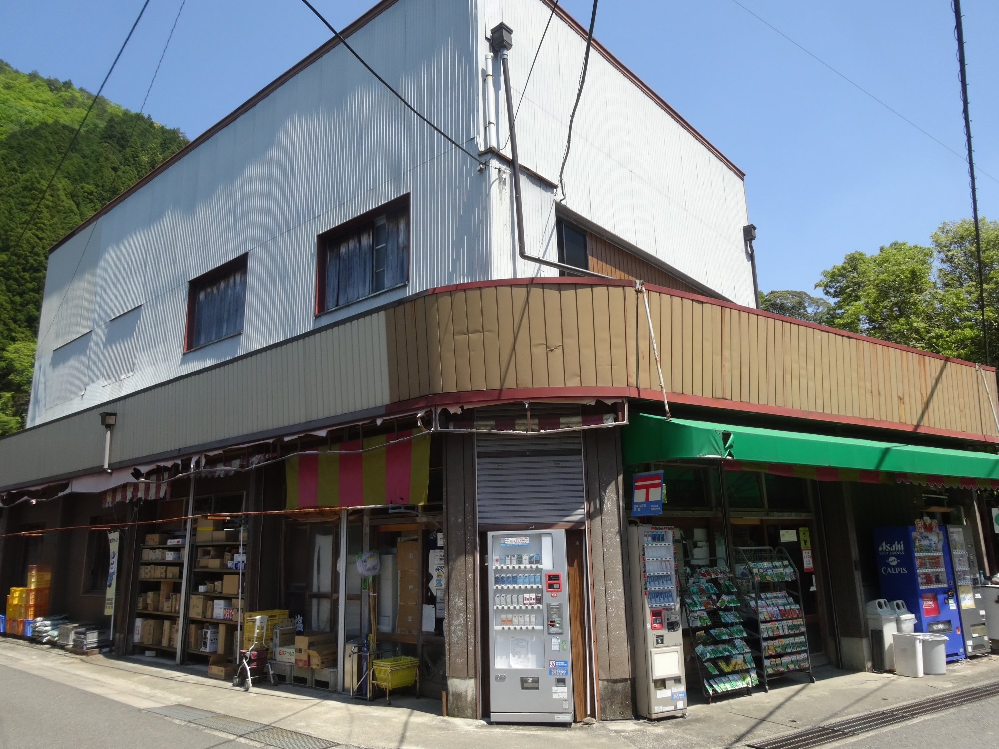 和歌山県日高郡日高川町寒川にある三尾屋商店